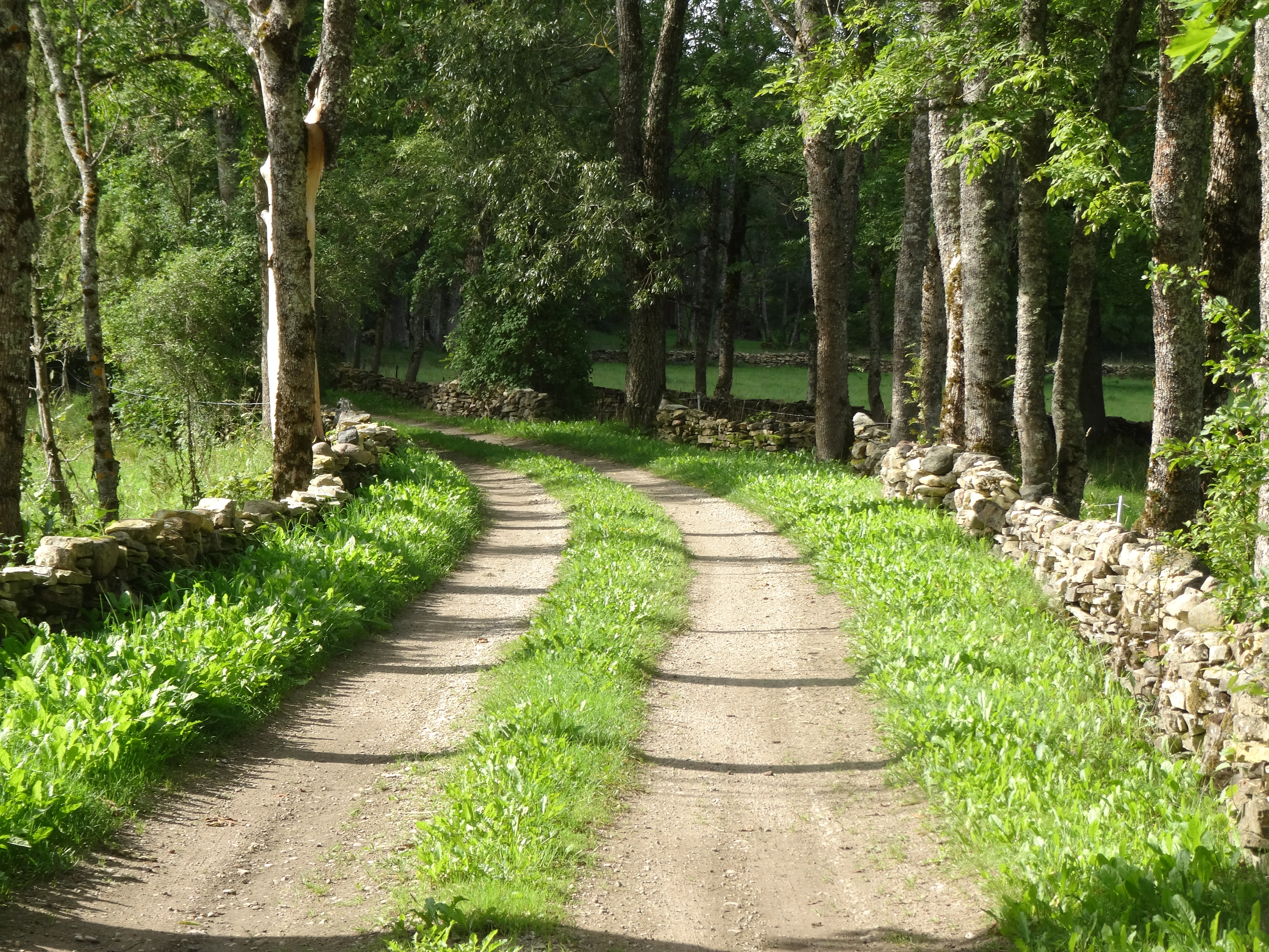 Pikavere küla kiviaiad tee ääres